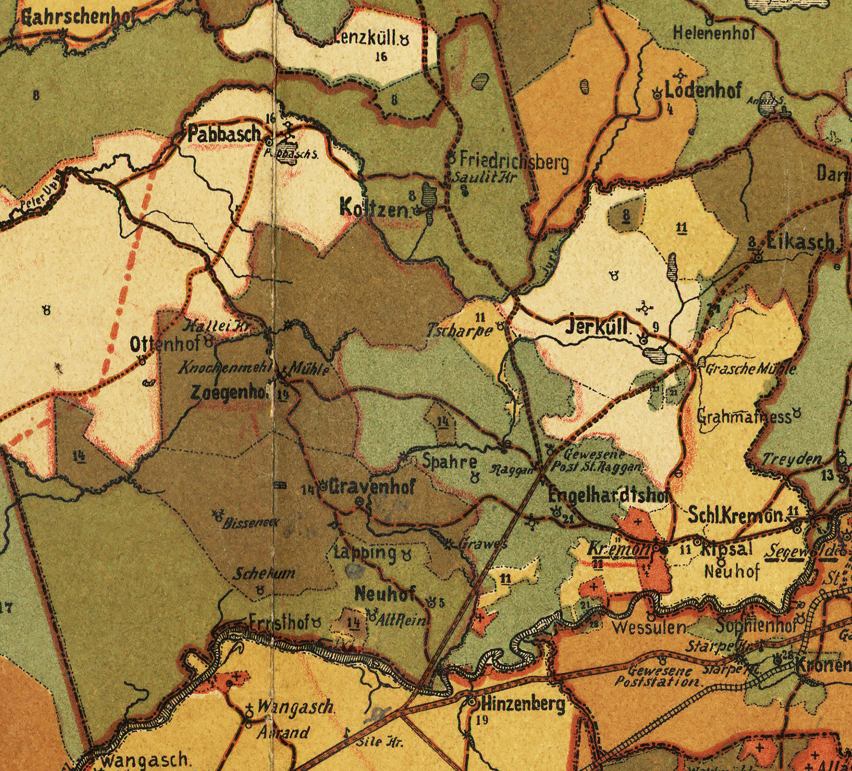 Krimulda kihelkonna mõisad 1905. aasta kaardil